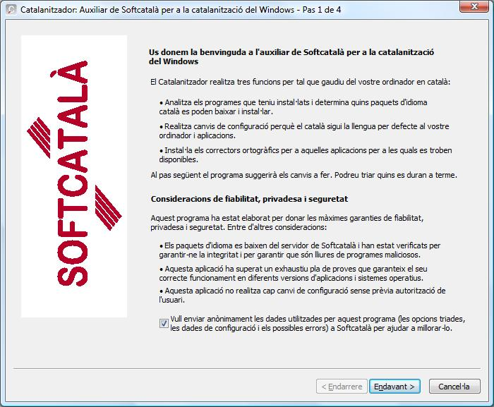 Captura del Catalanitzador per a Windows de Softcatalà.